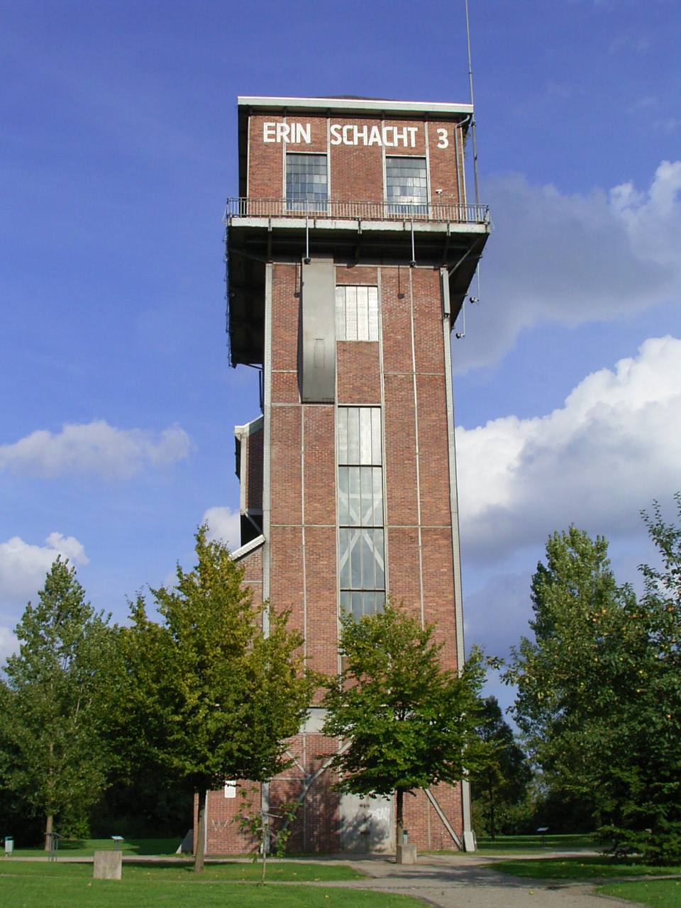 Förderturm des Wetterschachtes 3 der Zeche Erin zu Castrop-Rauxel im Stadtteil Schwerin